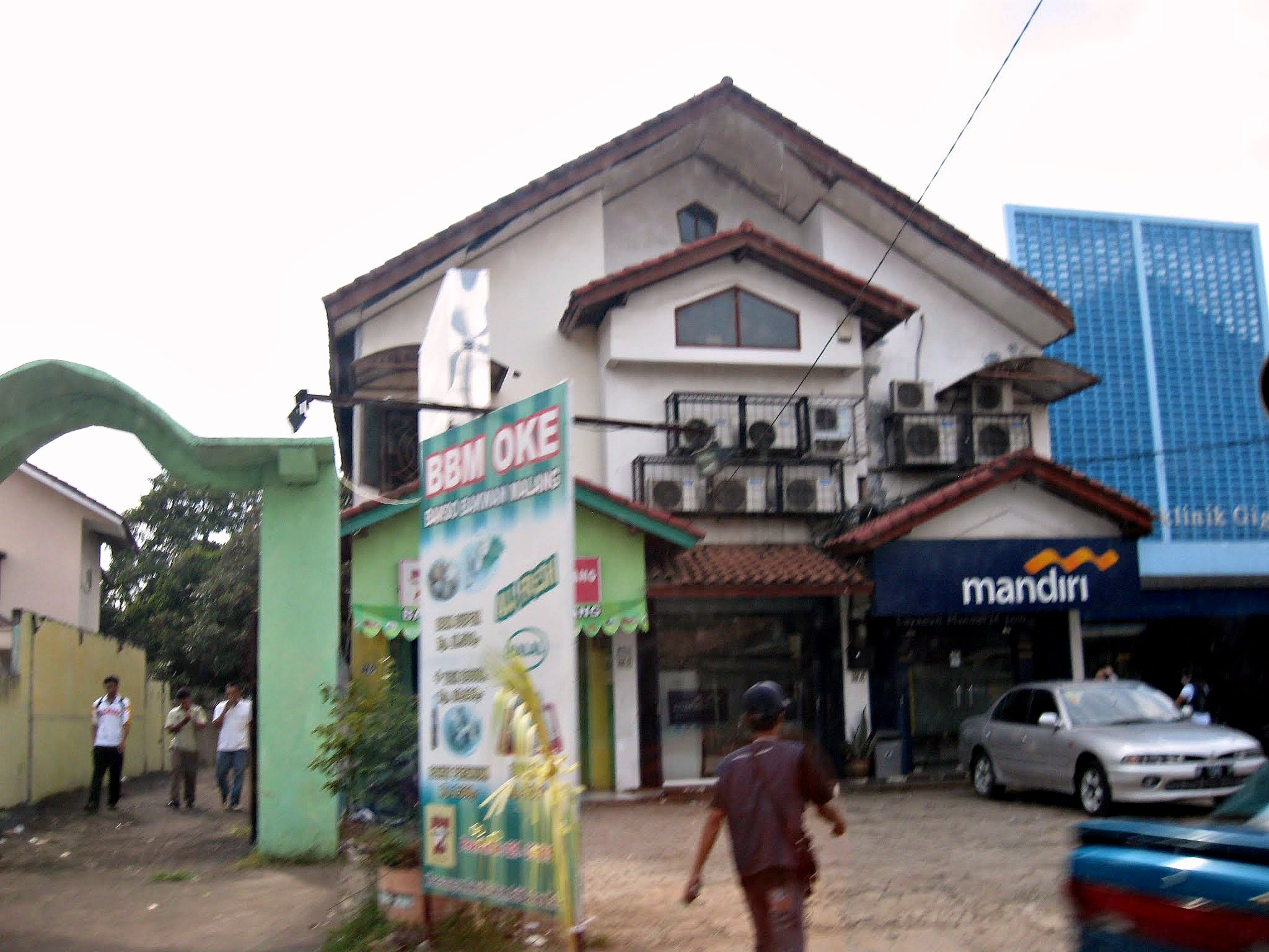 Bank Mandiri KCP Bekasi Ujung Aspal, Jatimurni